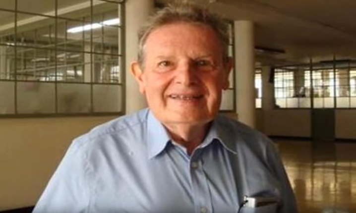 David Kapkin, nacido en la ciudad de Medellin. Realizo sus estudios academicos en Alemania e Italia. Al regresar a Medellin fue profesor universitario durante mas de 25 años. Autor de numerosos libros y articulos sobre los textos biblicos.